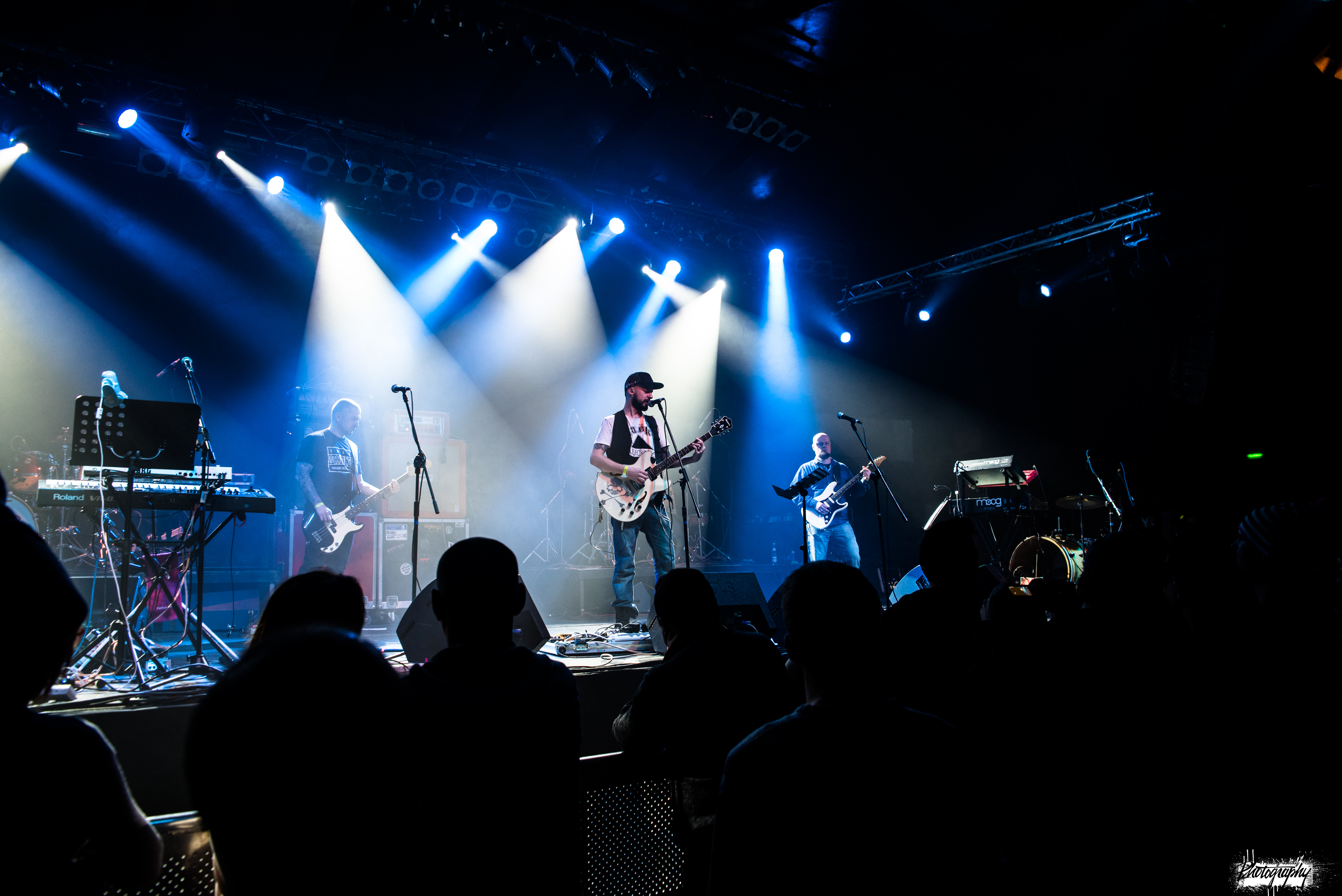 Mikołaj "Jaok" Janusz w czasie koncertu